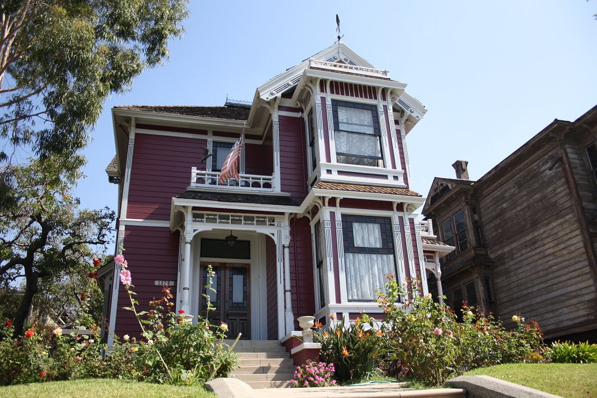 Vue de la maison de la série Charmed, Los Angeles, États-Unis.